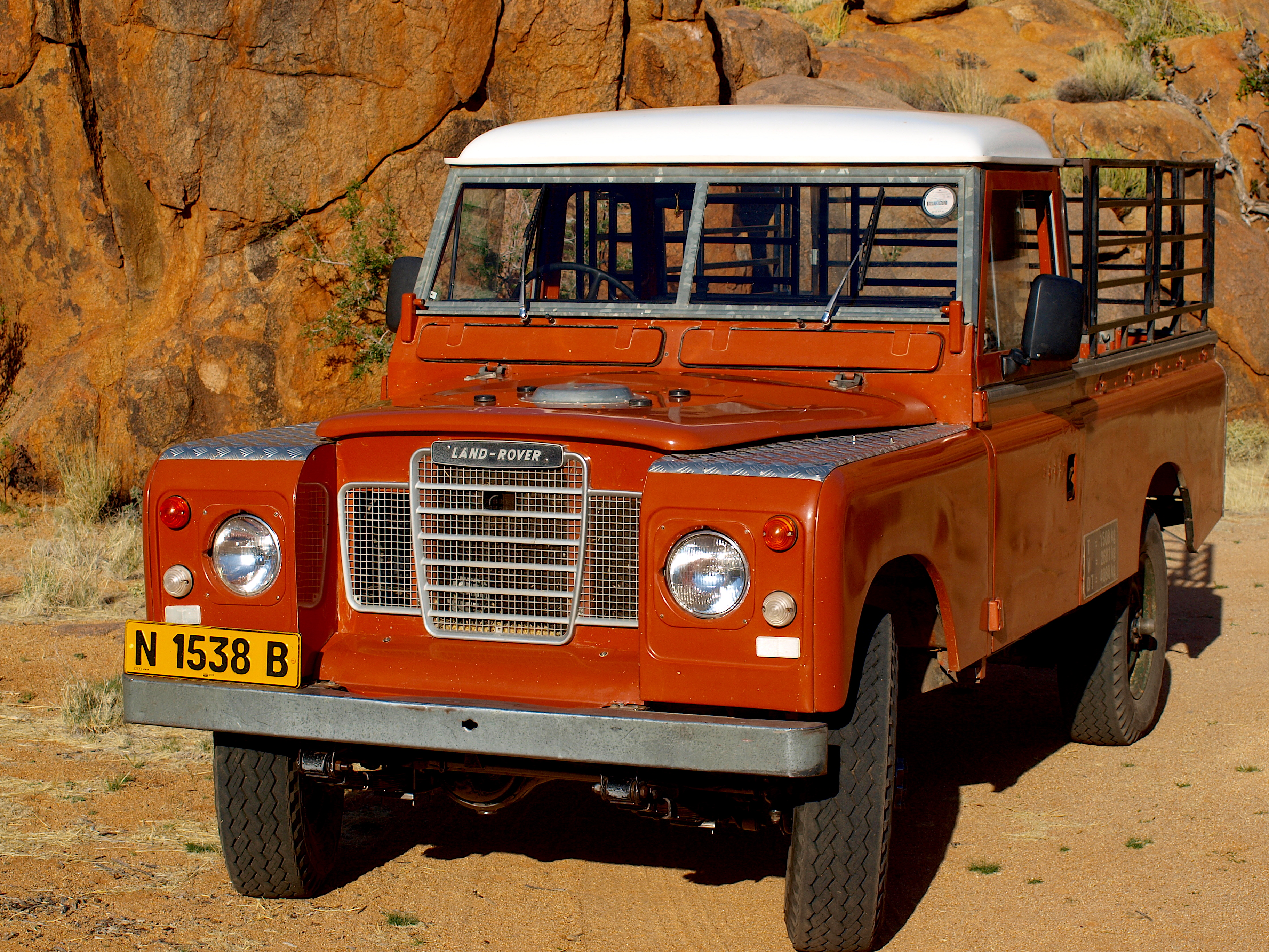 Landrover in Namibia (2009)